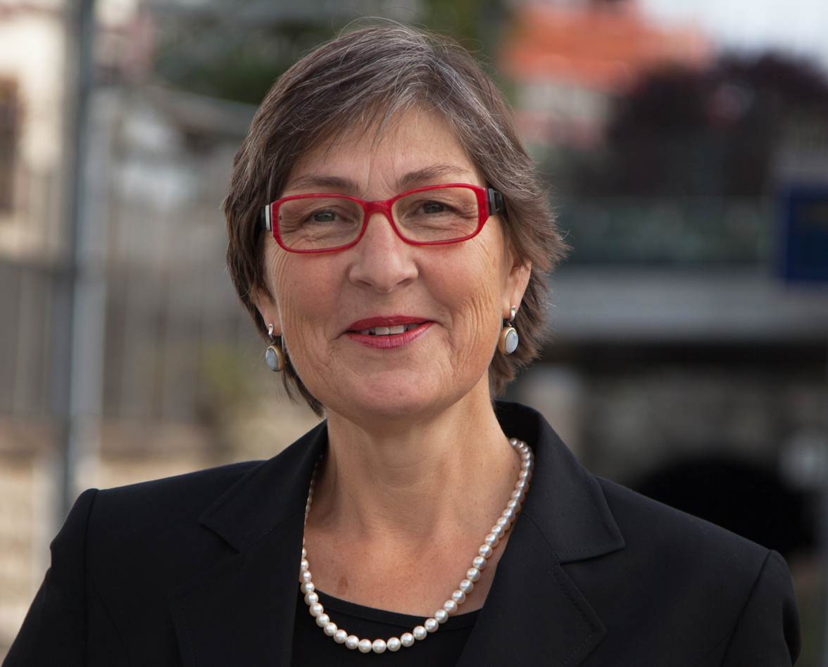 Portrait Claudia Pia Eimer